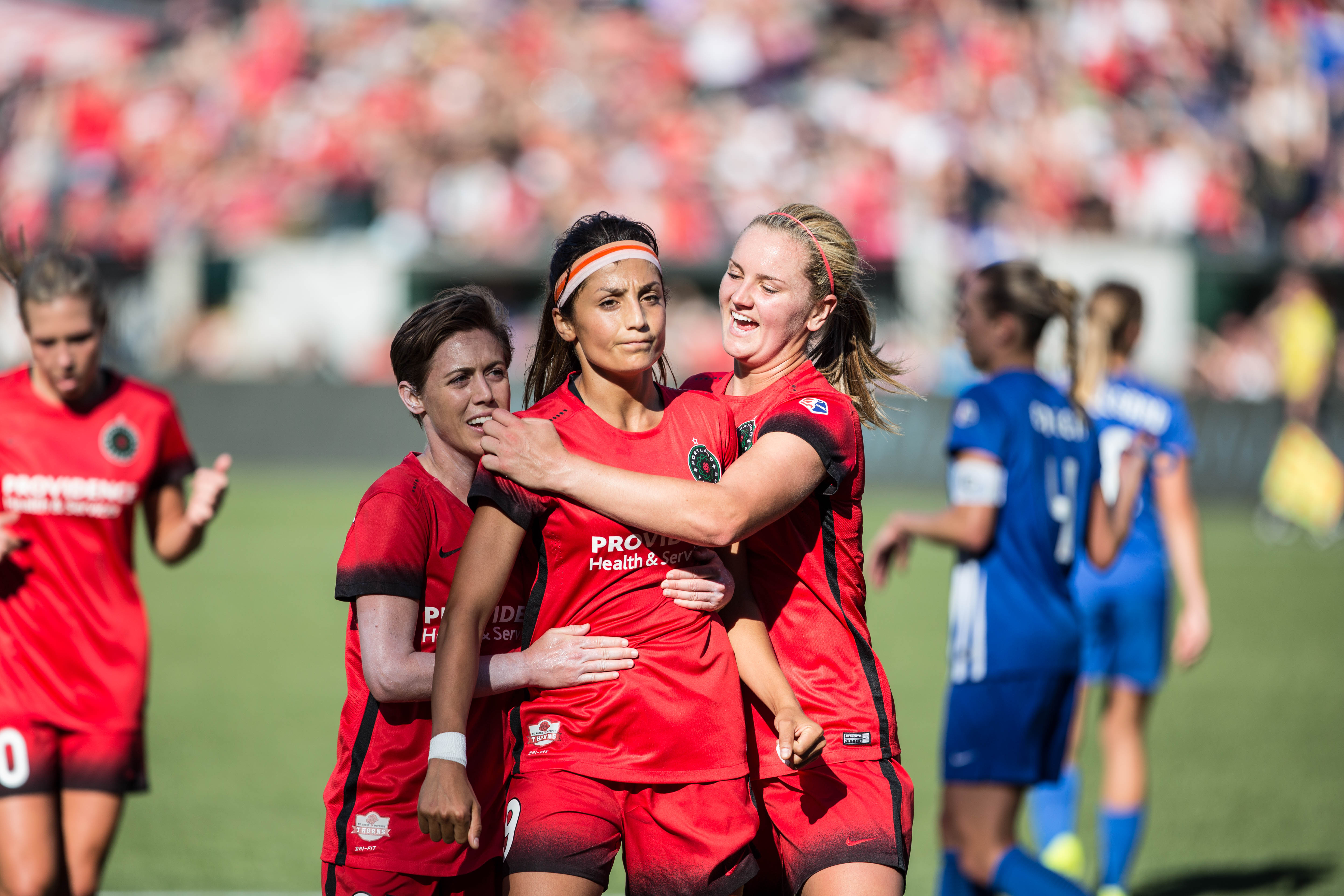 N42A2905.jpg